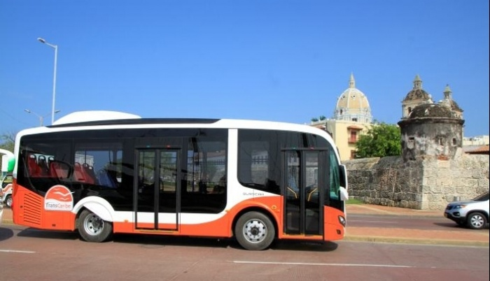 Bus Buseton O Alimentador De TransCaribe Operando Con Normalidad